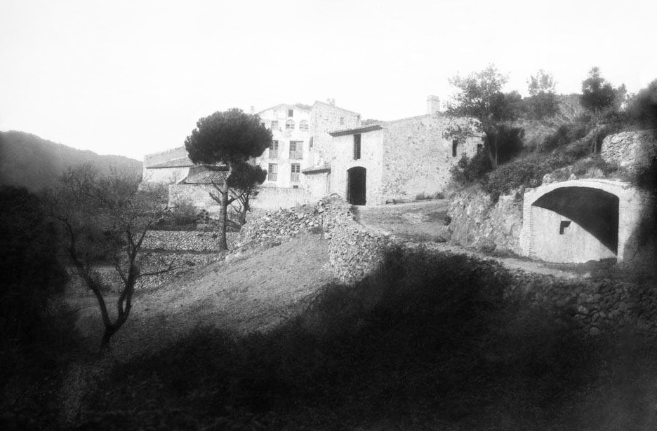 Imatge